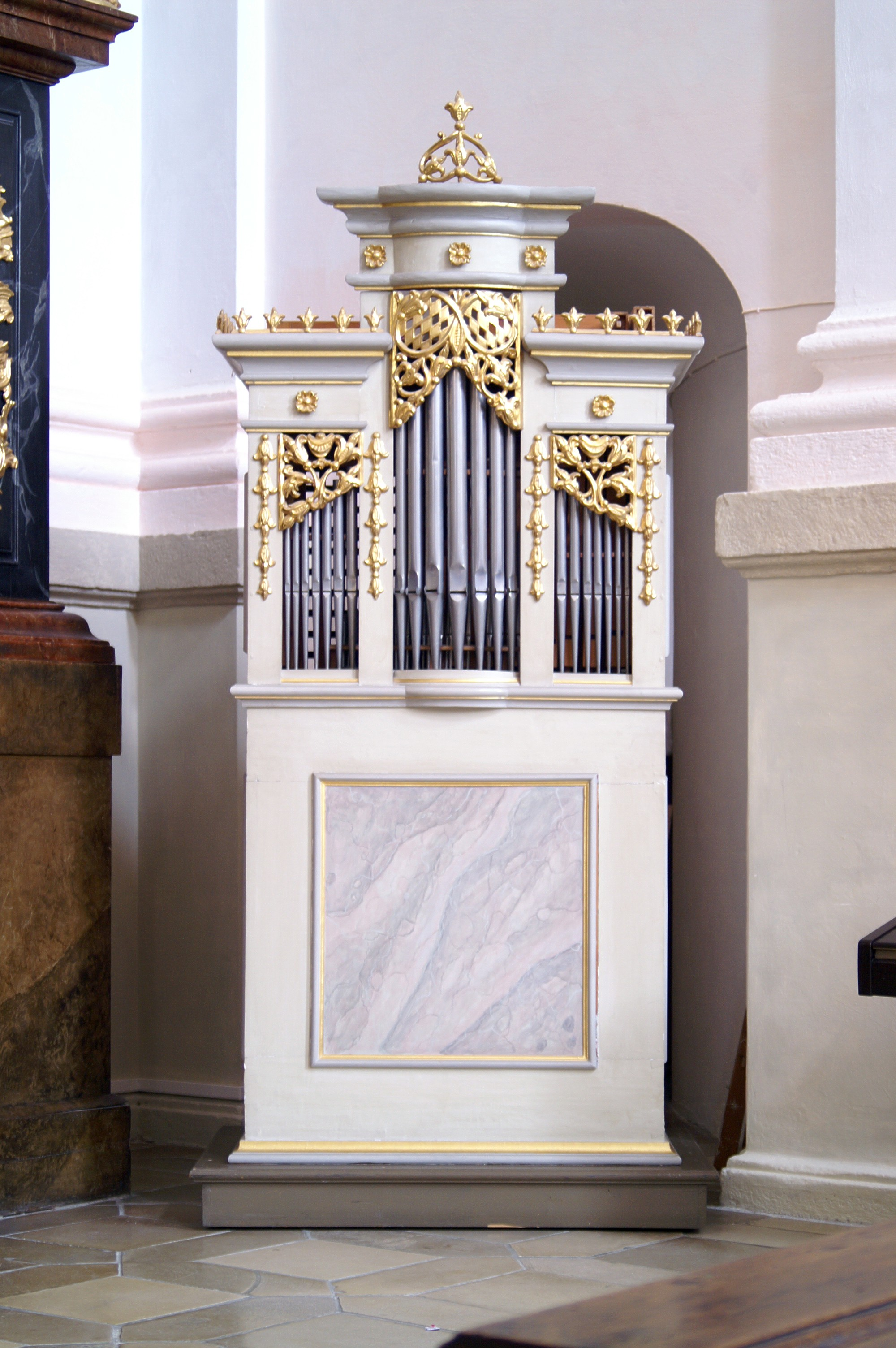 Historisches Orgelpositiv in der Basilika